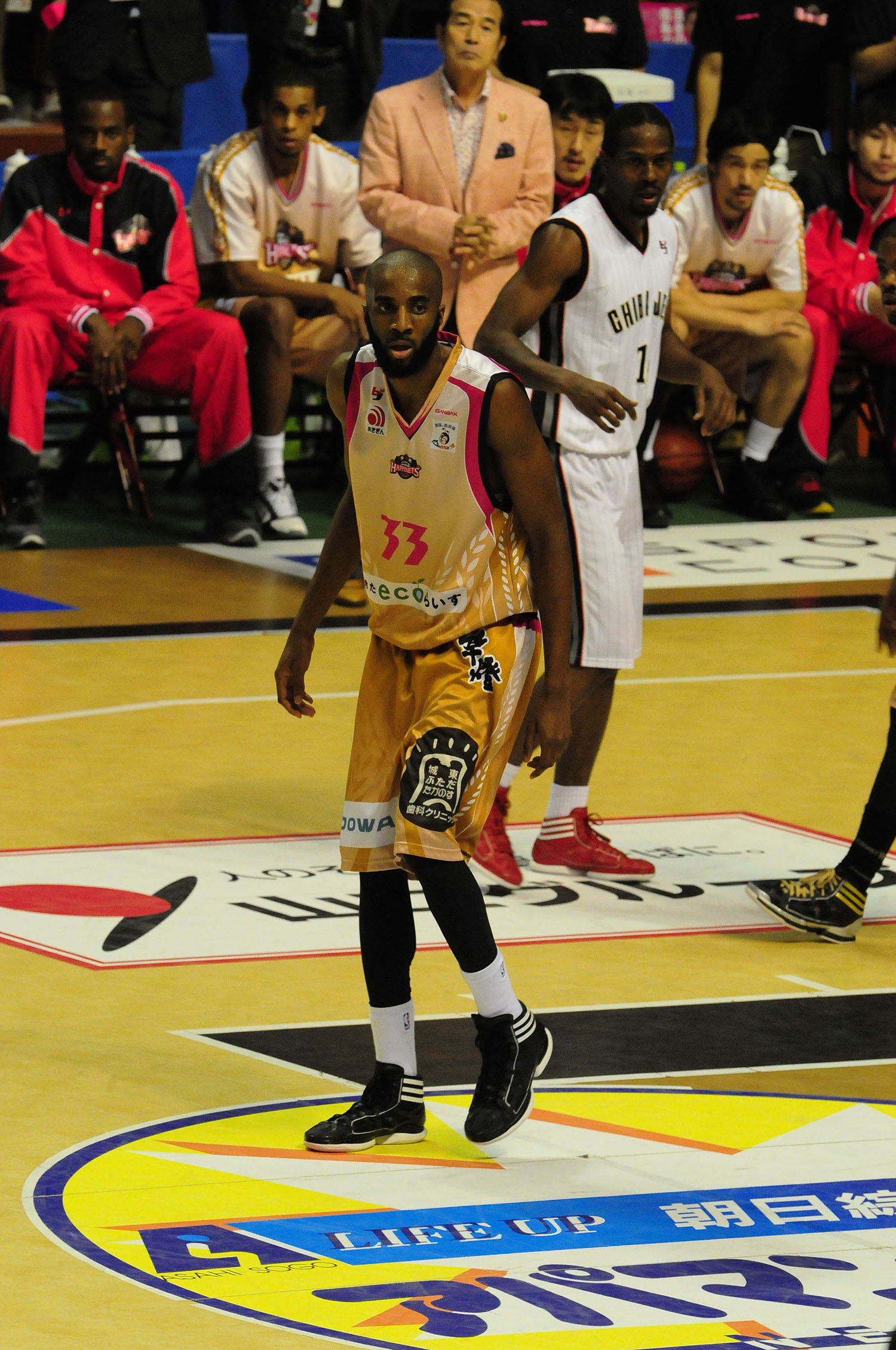 秋田ノーザンハピネッツ、ブランドン・ウォレス選手。秋田市立体育館で。